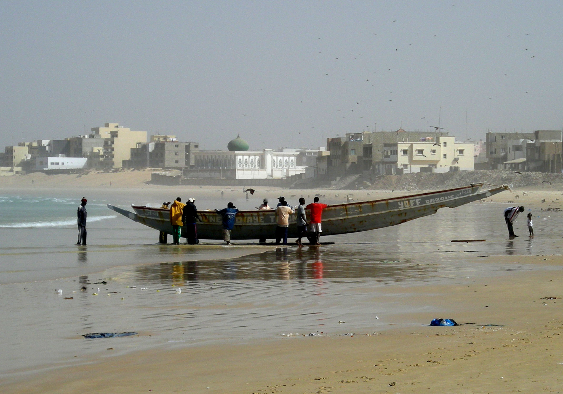 La mosquée layène de Yoff (Dakar, Sénégal)